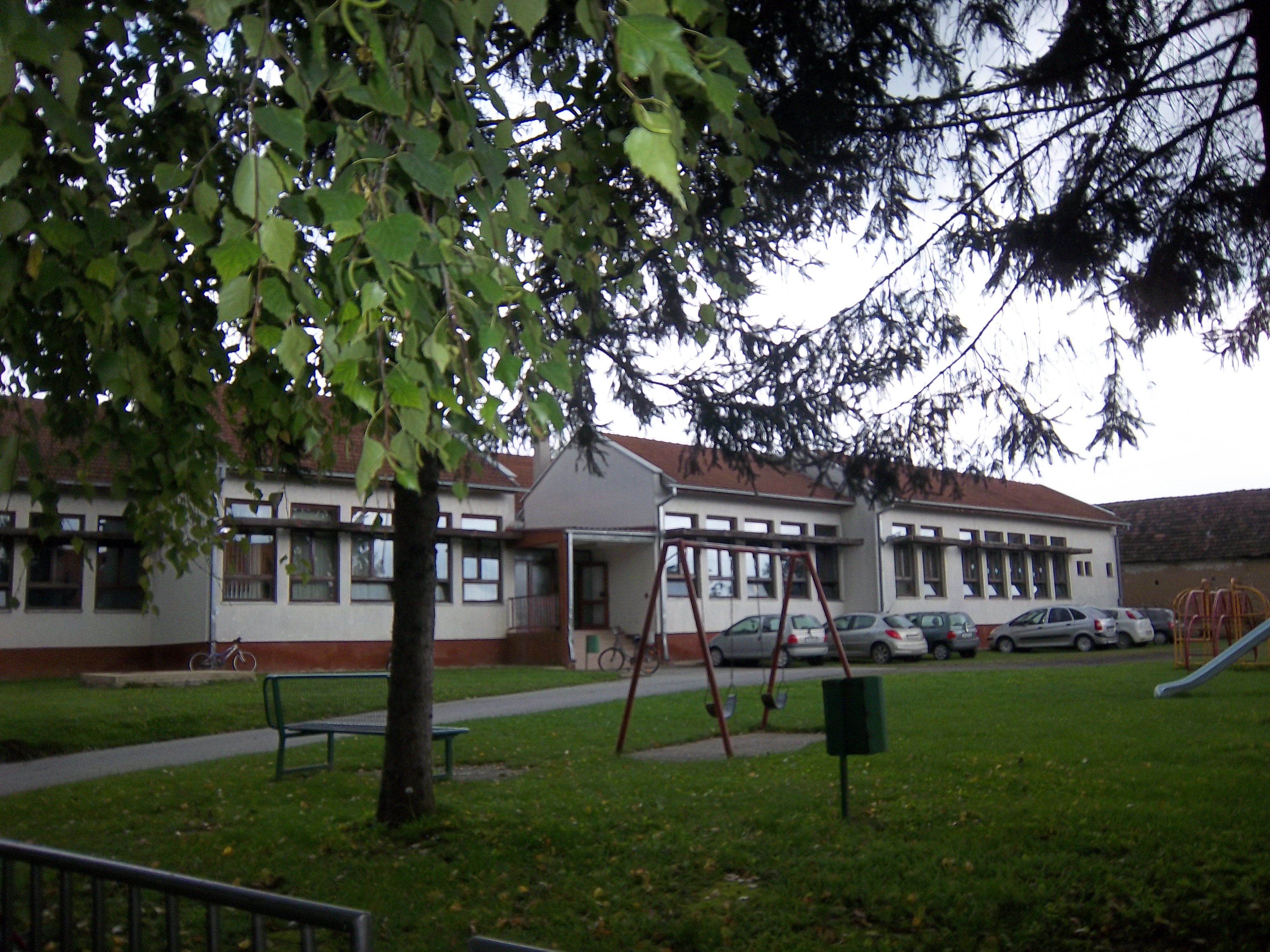 Српски (ћирилица): Основна школа Илача-Бановци у Илачи (Република Хрватска)